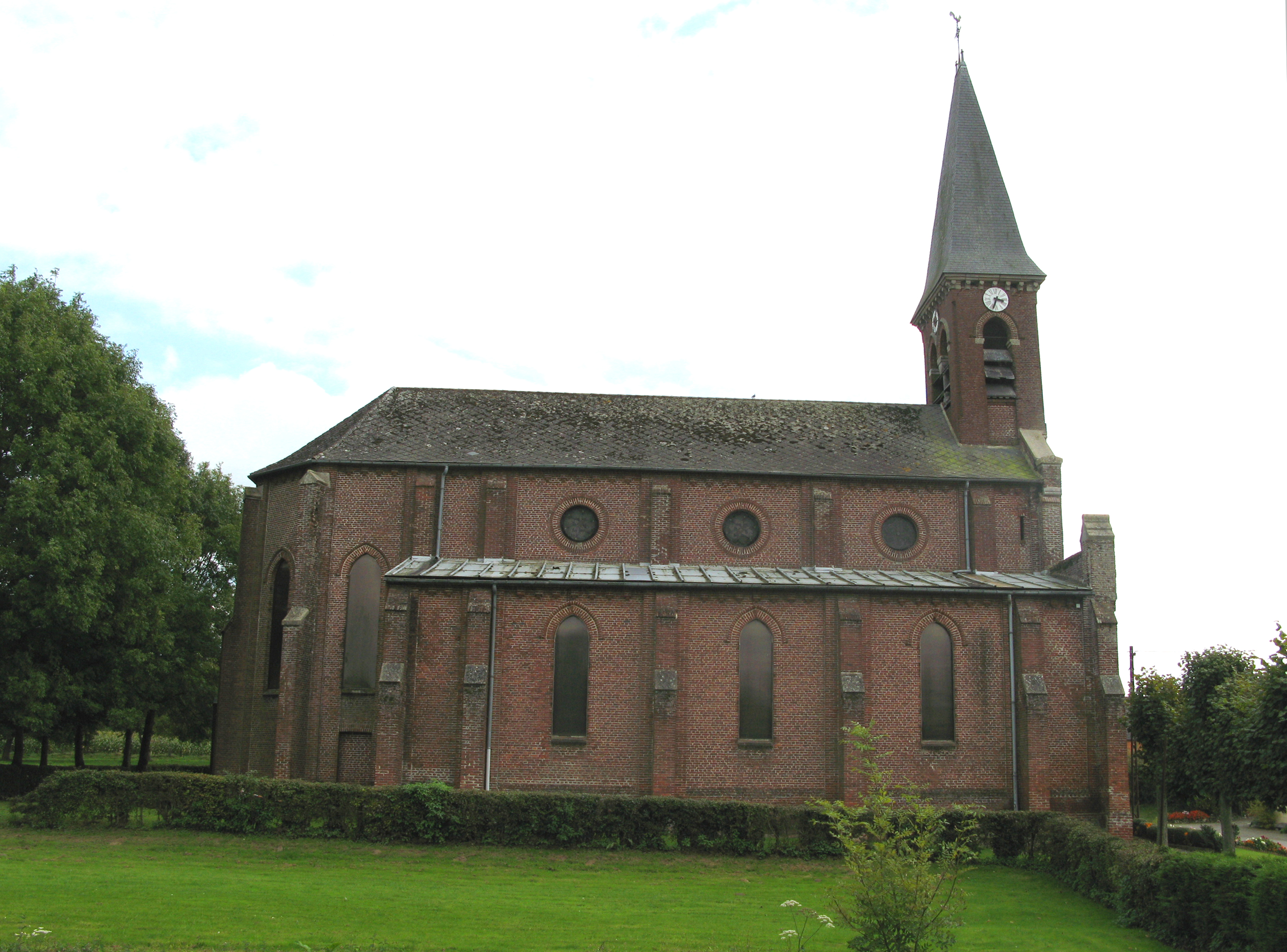 Le Boujon (Aisne, France) - L'église (façade nord) du village dépendant de la commune de Buironfosse.